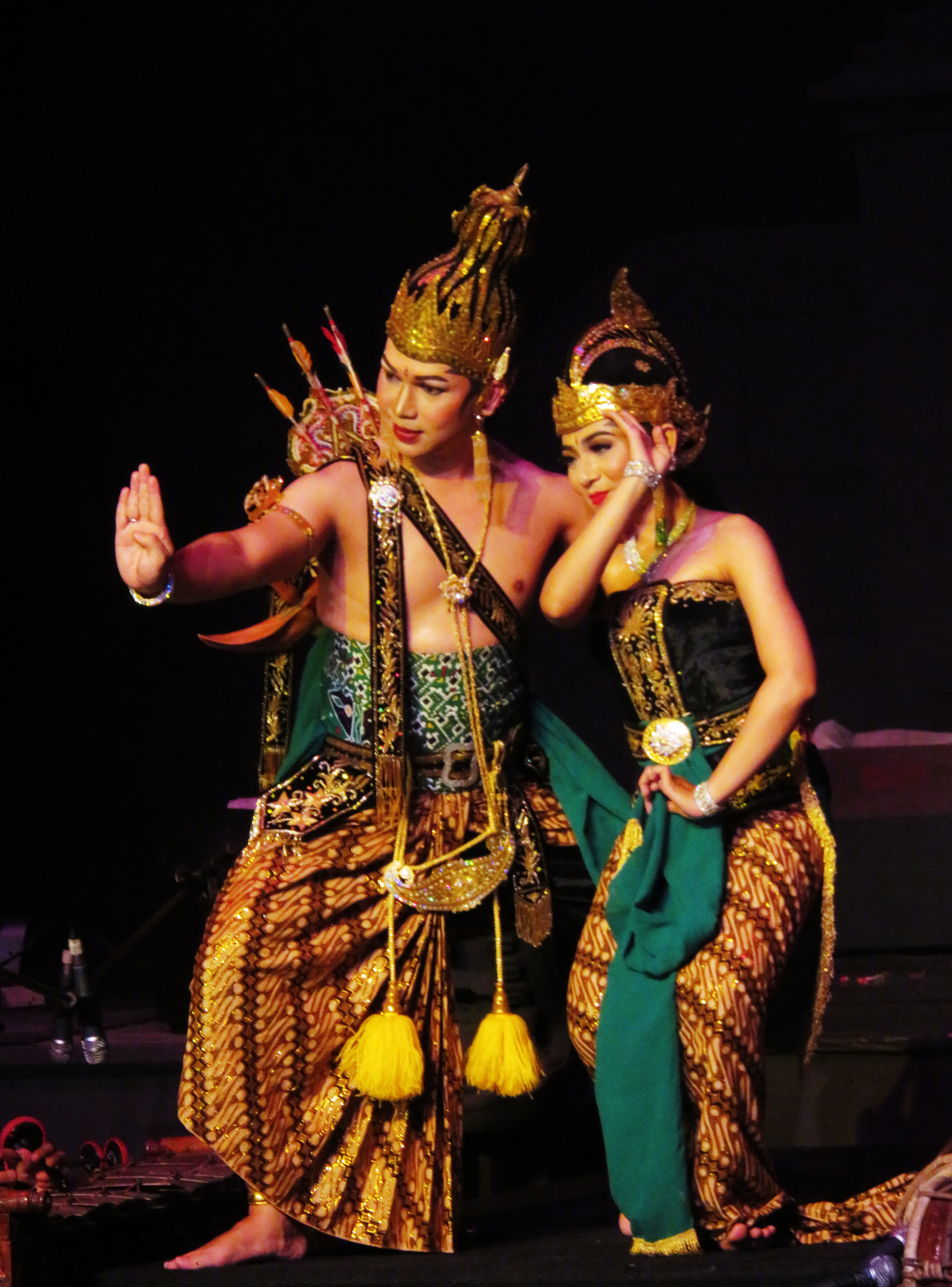 Dua tokoh utama dalam Sendratari Ramayana Prambanan. Kiri: Ramawijaya, Kanan: Shinta